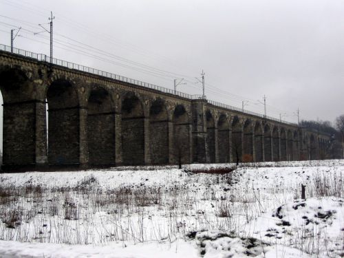 Bolesławiec - wiadukt kolejowy nad Bobrem (linia kolejowa nr 282) z 1846 r.